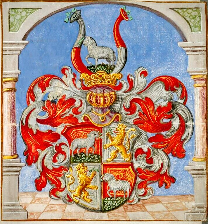 Wappen der Fleischbein von Kleeberg